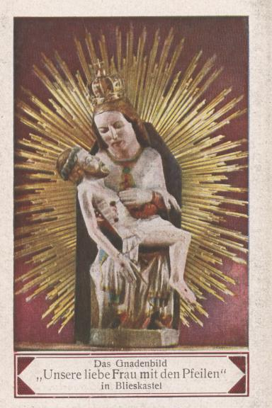 Pfeilemadonna, Hl.-Kreuz-Kapelle Blieskastel